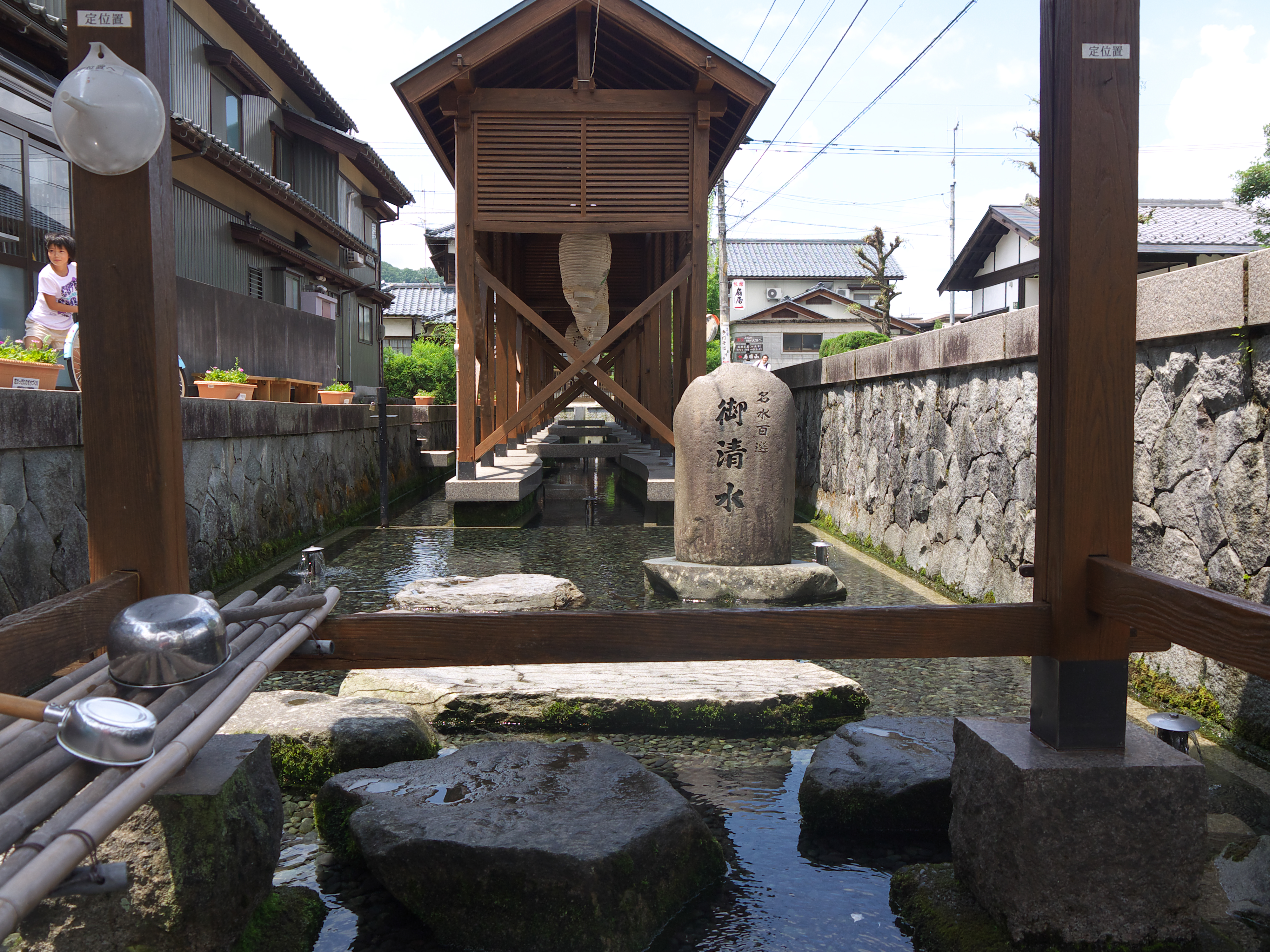 福井県大野市御清水